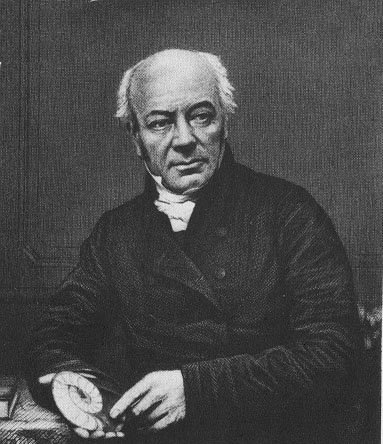 William Buckland